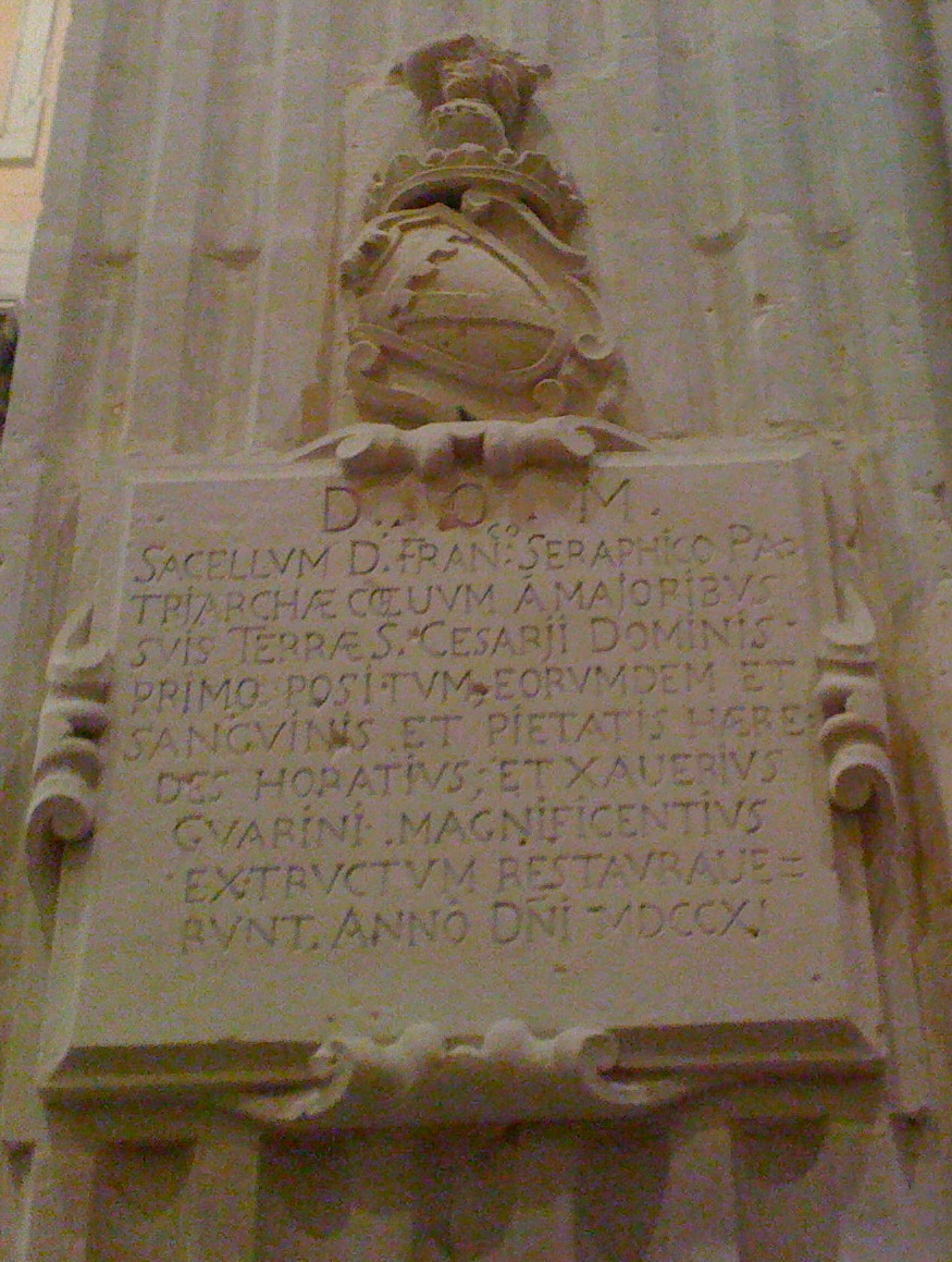 Blason de la famille Guarini di Poggiardo avec épigraphe latine dans l'église San Francesco della Scarpa (XVII-XVIIIe siècles) à Lecce, Italie.